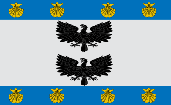 Bandera de la municipalidad de La Reina, basado en su escudo